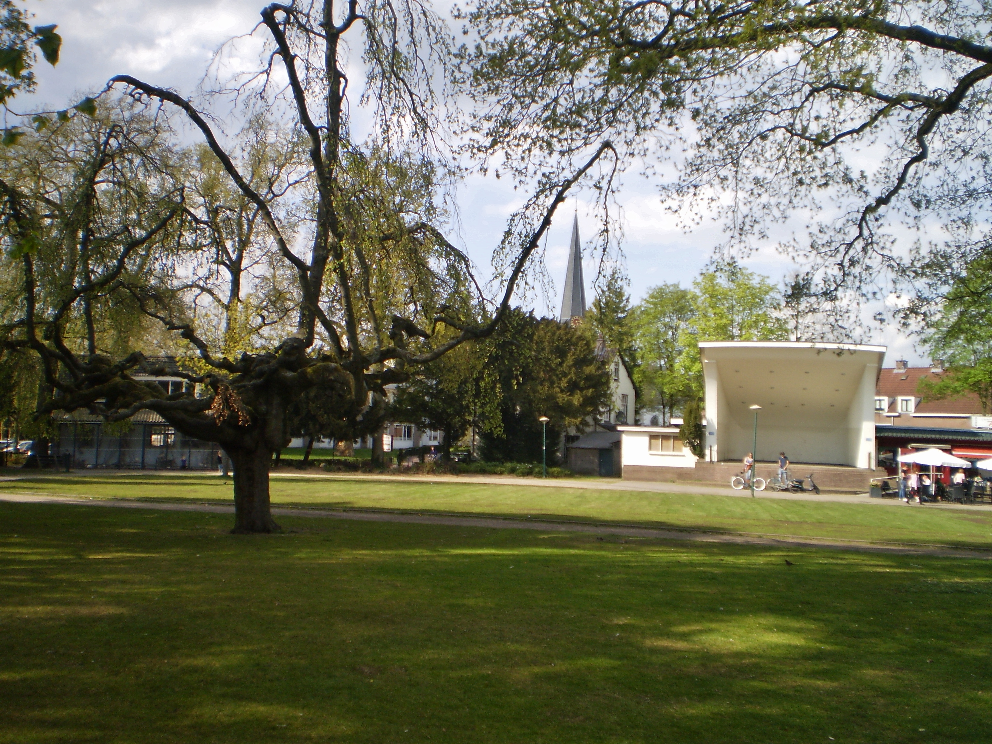 Pekingtuin in Baarn muziekkoepel met de Pauluskerk op de achtergrond